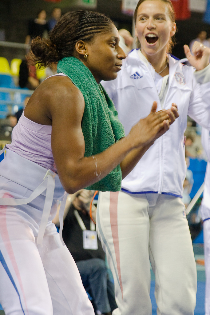 Prise le 7 juillet 2007 aux Championnats d'Europe d'escrime, à Gand (Flandre-Orientale) en Belgique.